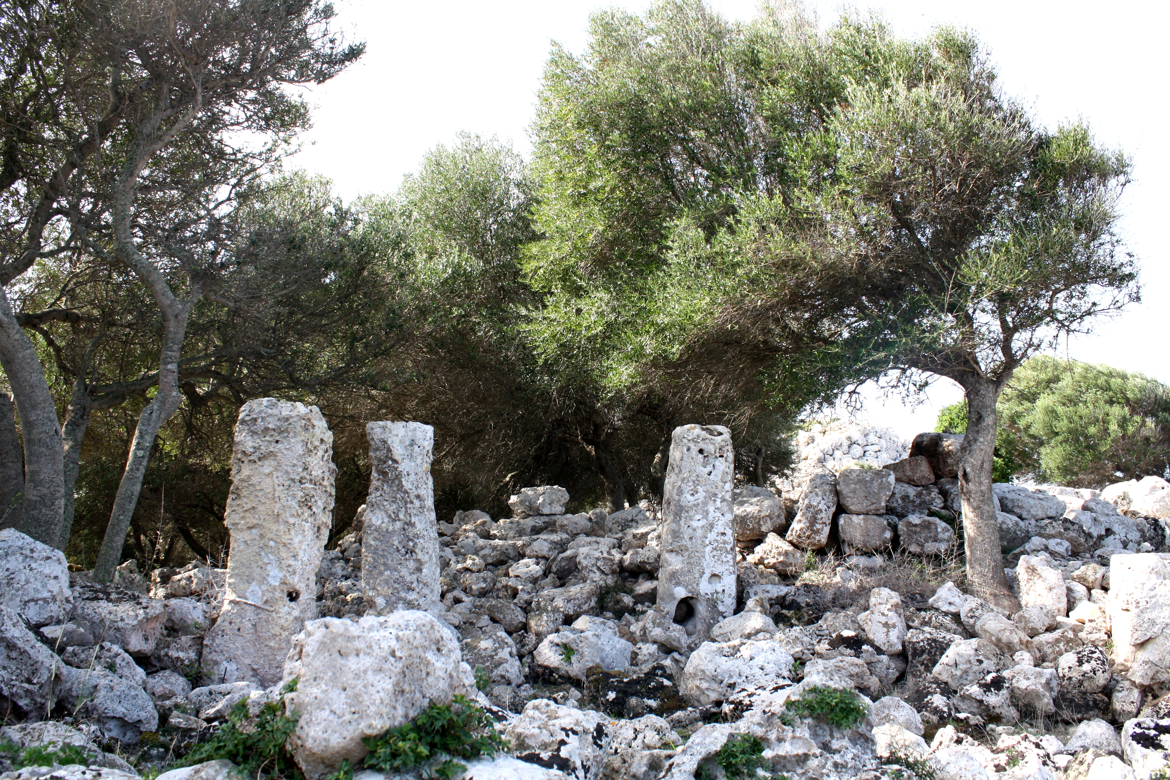 Talayotisches Dorf von Sant Agustí: Reste eines posttalayotischen Hauses